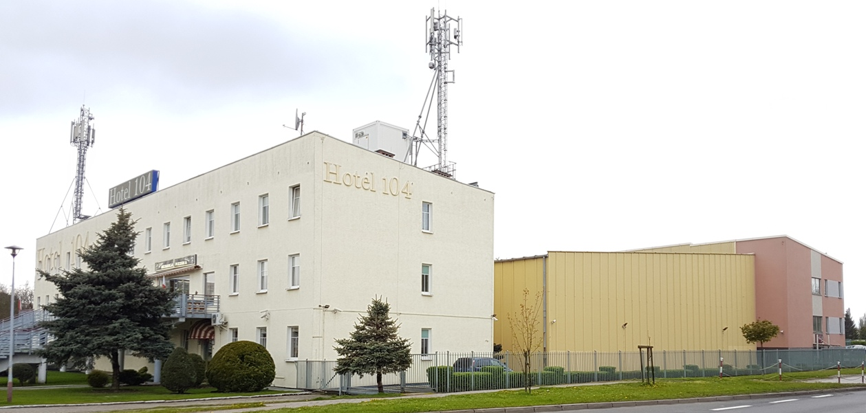 Stargard, 05.05.2015r. Hotel 104 z halą OSiR